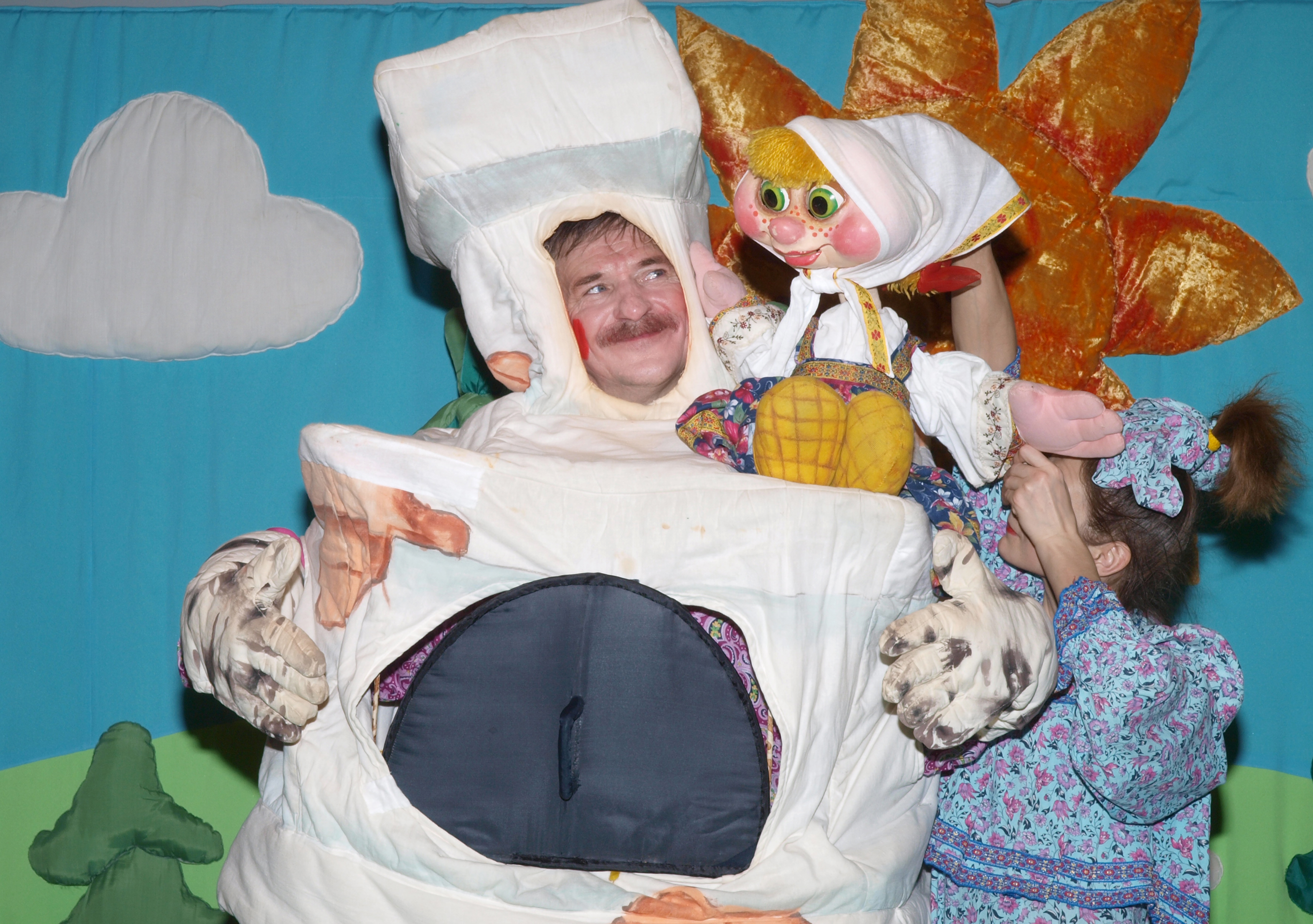 Сцена из спектакля "Гуси-лебеди"